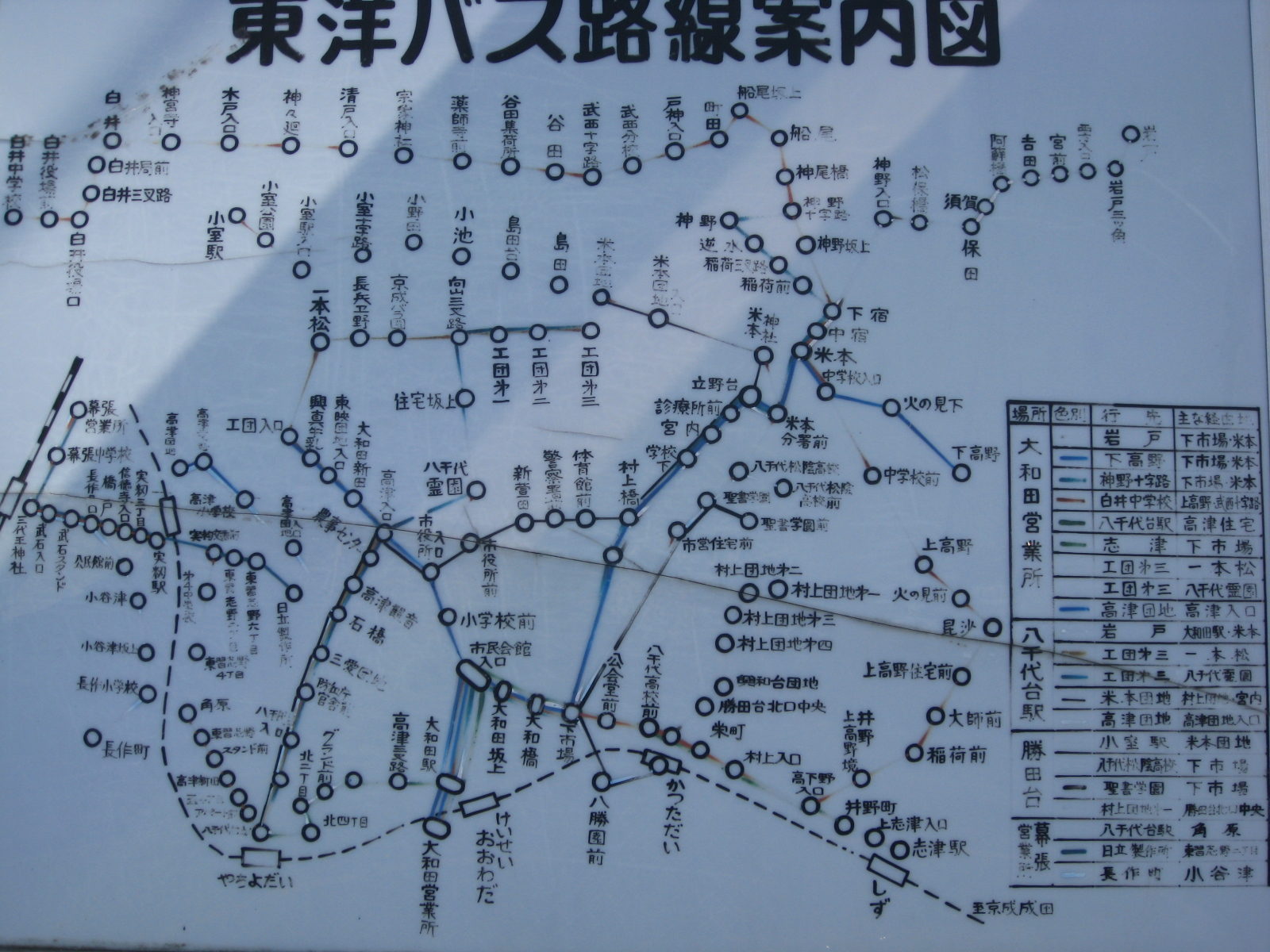 東洋バスの昔の路線図。